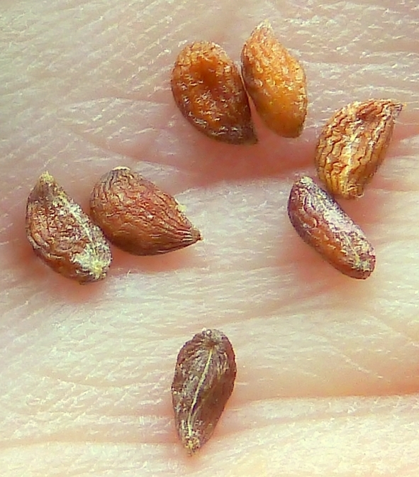 Ananas comosus (Piña, Ananá) - Semillas sueltas. - Comercio, Madrid (España).